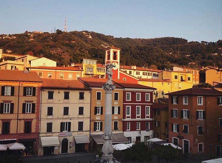 vista dall'alto di piazza mercurio